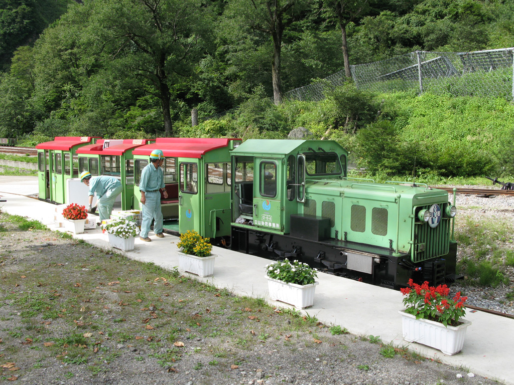 Tateyama Sabo Tramway (Tateyama Erosion Control Tramway) at Mizutani Station.